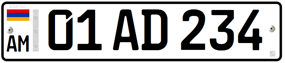 پلاک خودروهای شخصی در ارمنستان